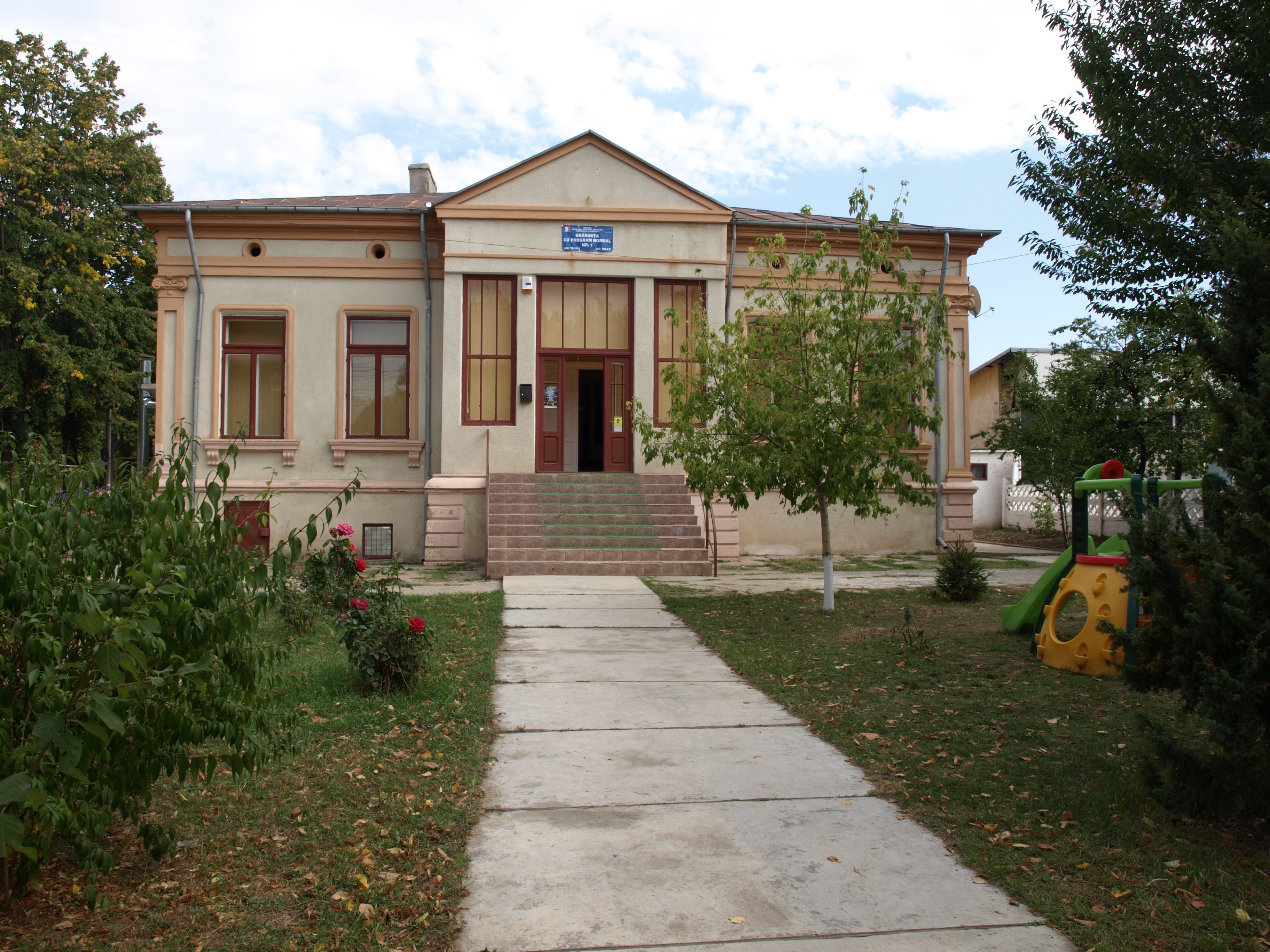 Casa Subofițerilor